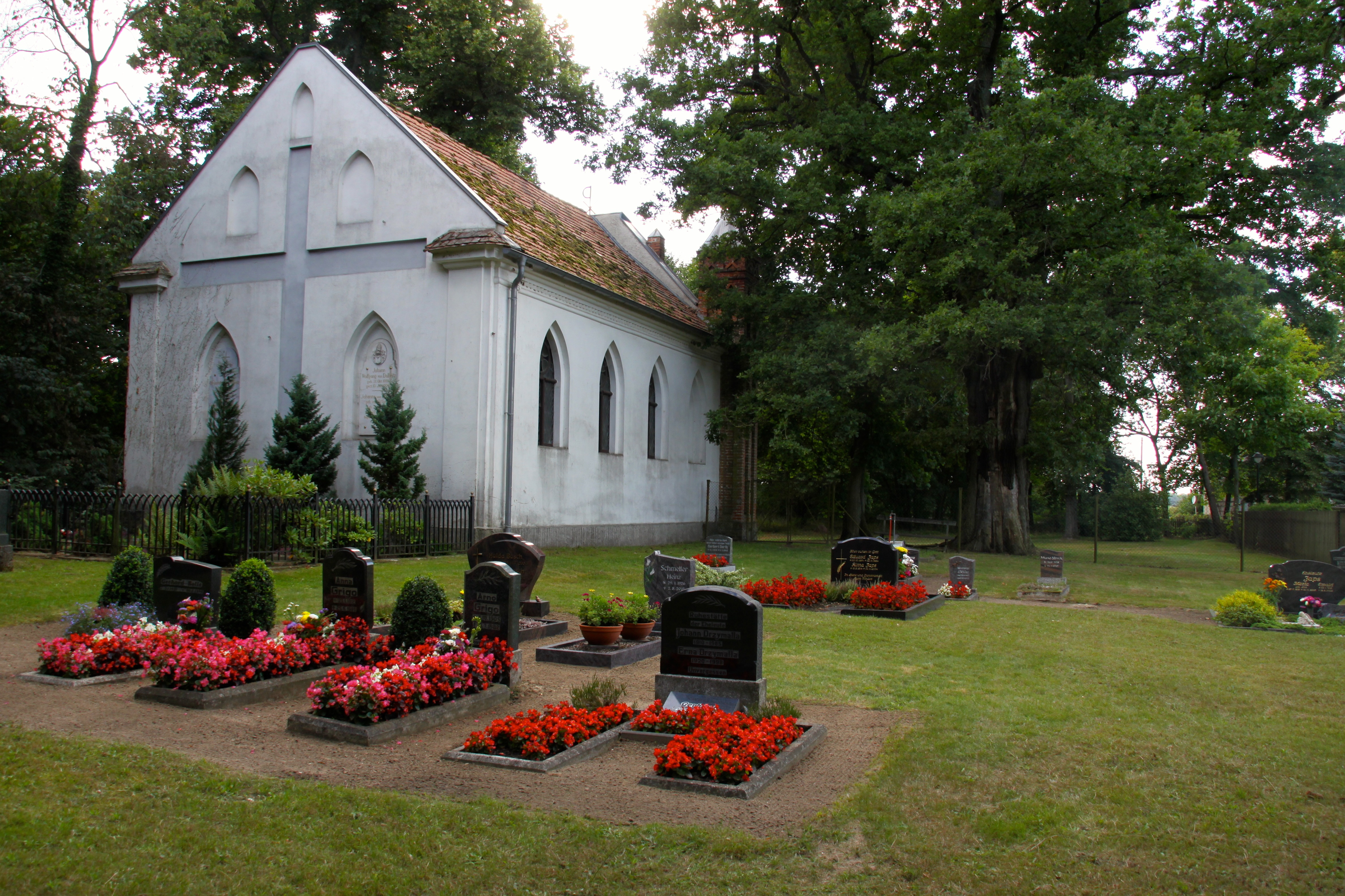 Kirche Tornow Rückseite